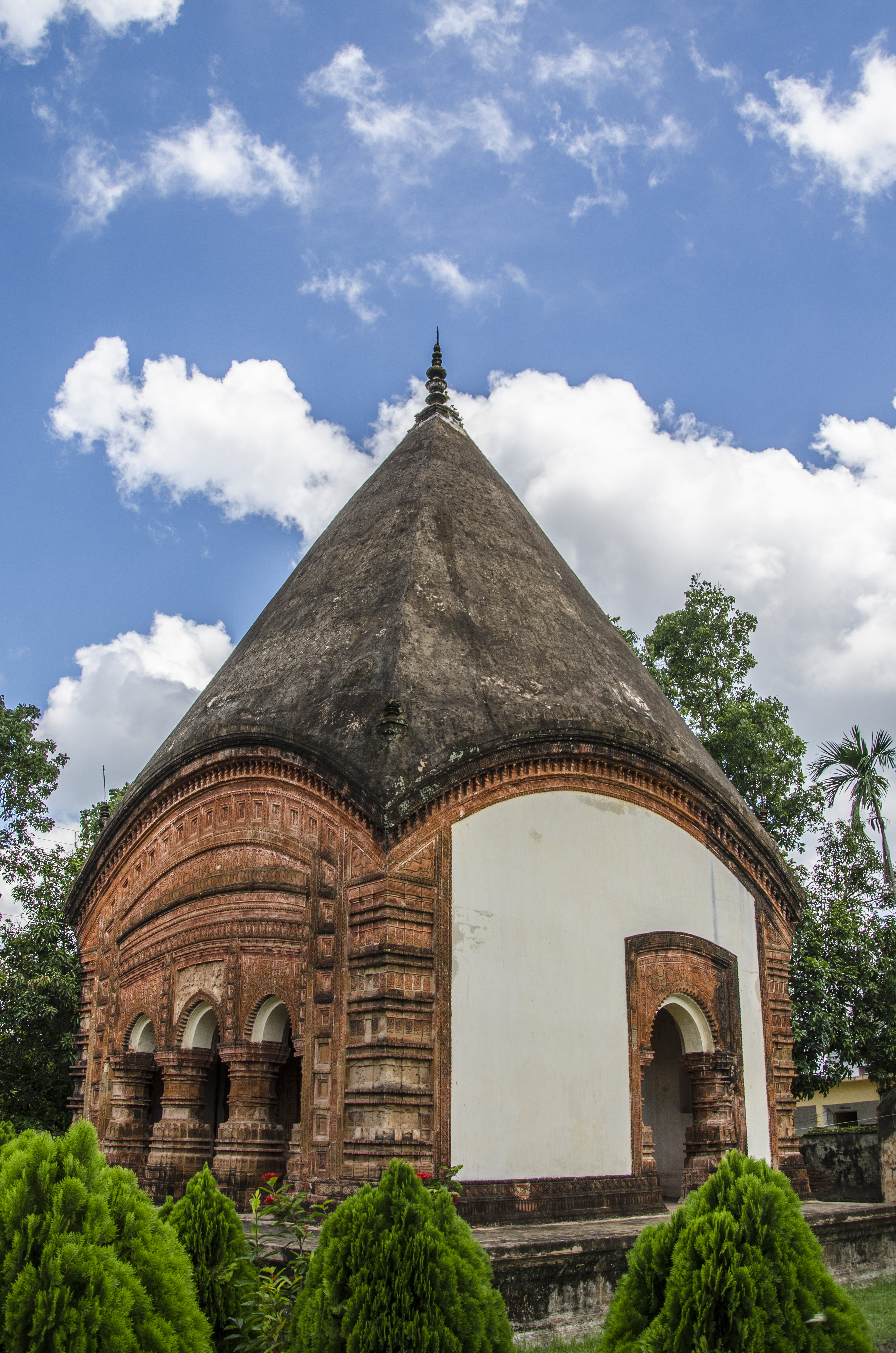 সম্মুখ প্রান্ত থেকে ছোট গোবিন্দ মন্দিরের ছবি